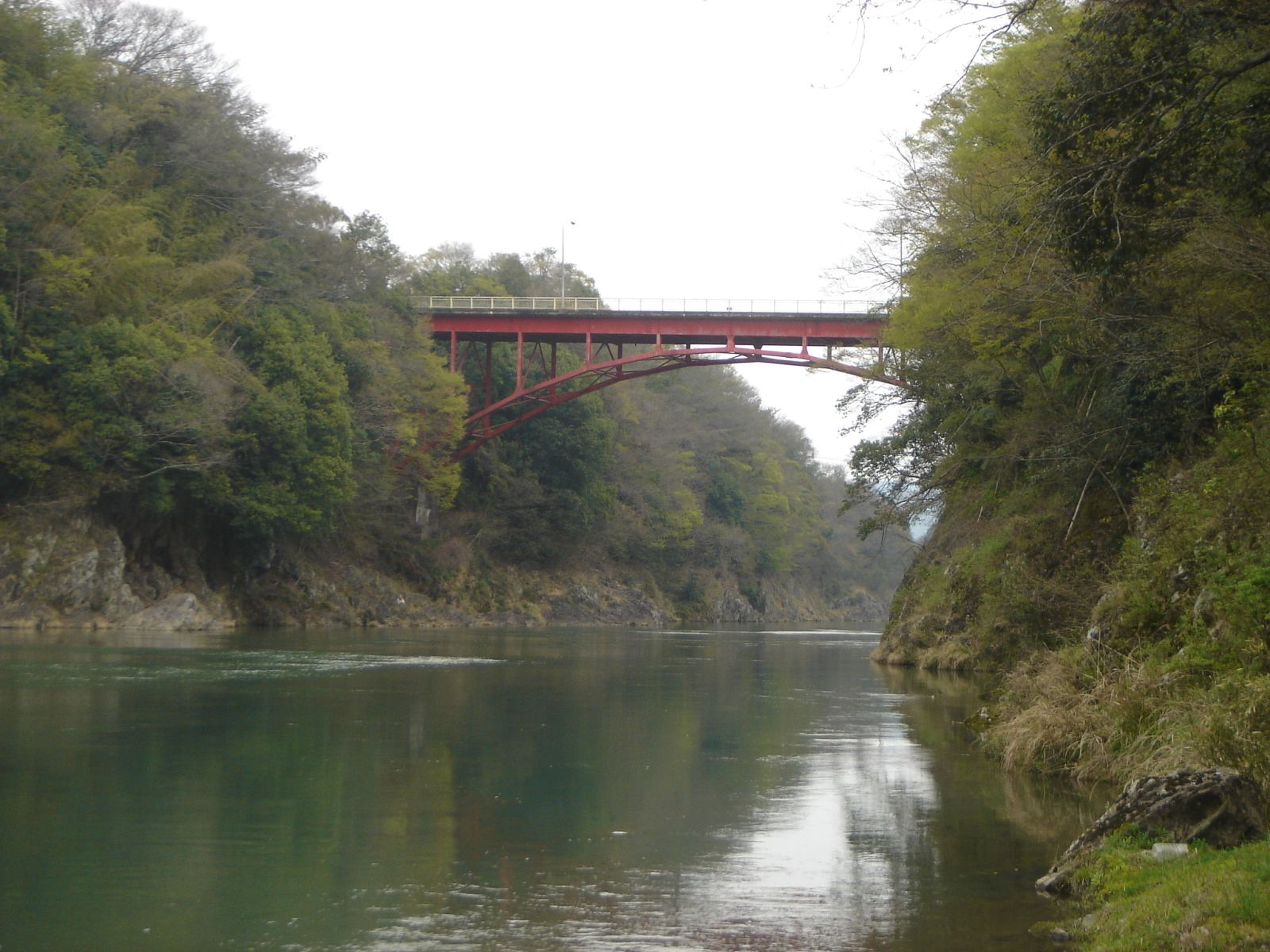 Shimowatari Bridge(下渡橋、木曽川),Kani,Gifu,Japan(岐阜県可児市)で下流側の兼山湊跡より撮影。